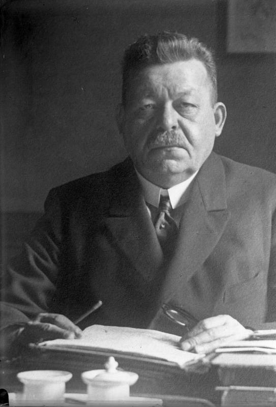 Zum 25. Todestag des ersten deutschen Reichspräsidenten Friedrich Ebert am 26. Februar 1925 Letzte Aufnahme des Reichspräsidenten Ebert, photographiert am 15. Februar, vor 14 Tagen an seinem Schreibtisch.